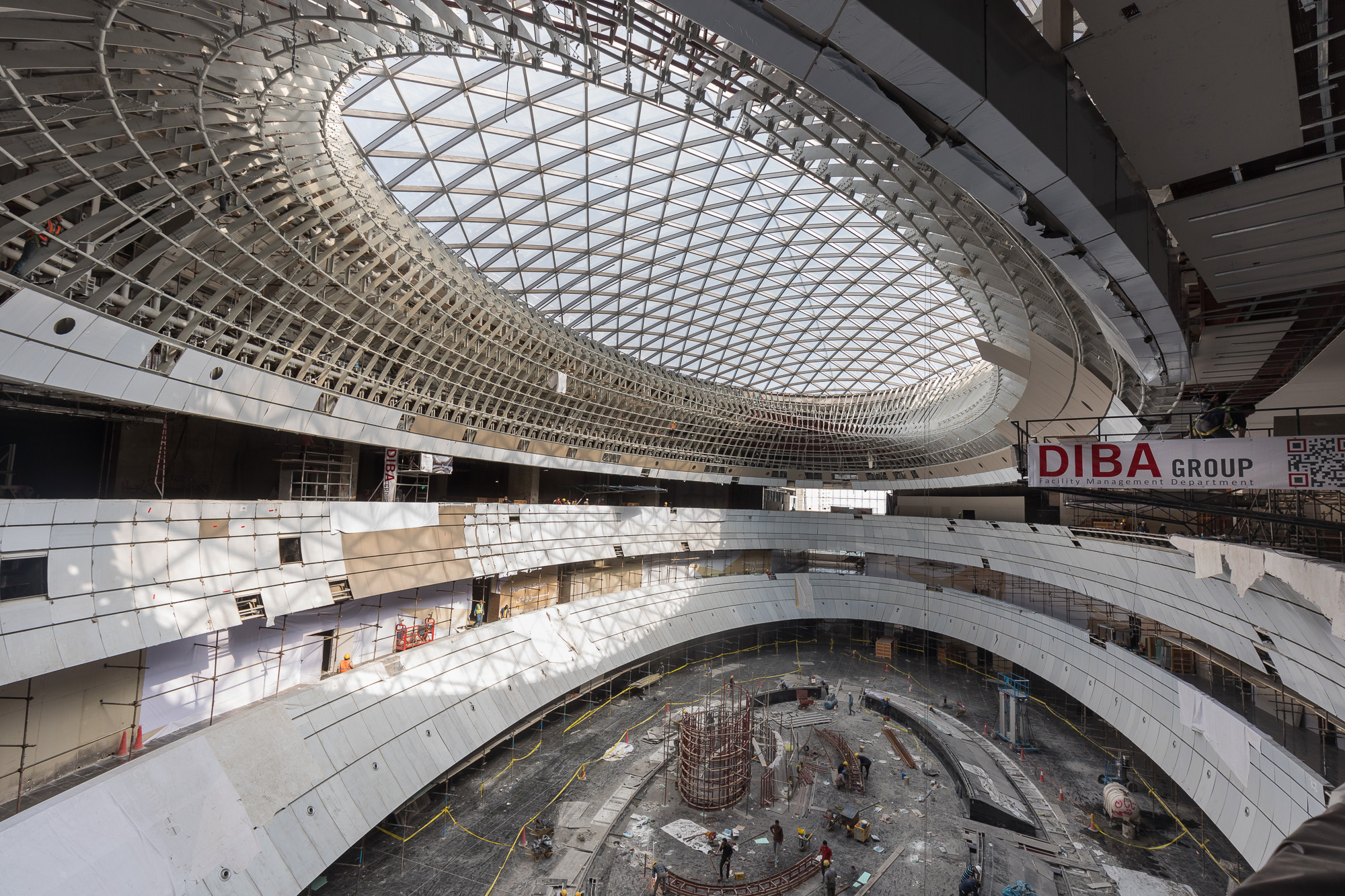 نمای داخلی نمایشگاه خودرو ایران مال